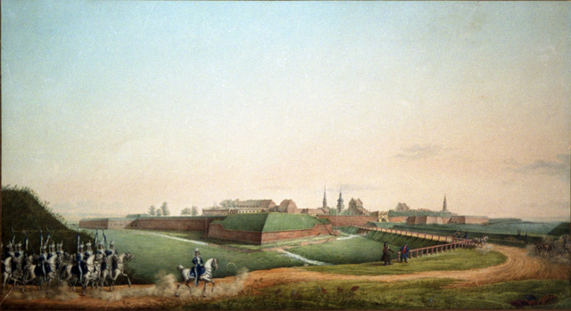 Zamość